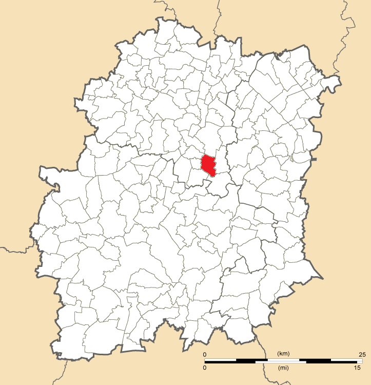 Carte de position de Marolles-en-Hurepoix en Essonne (91)